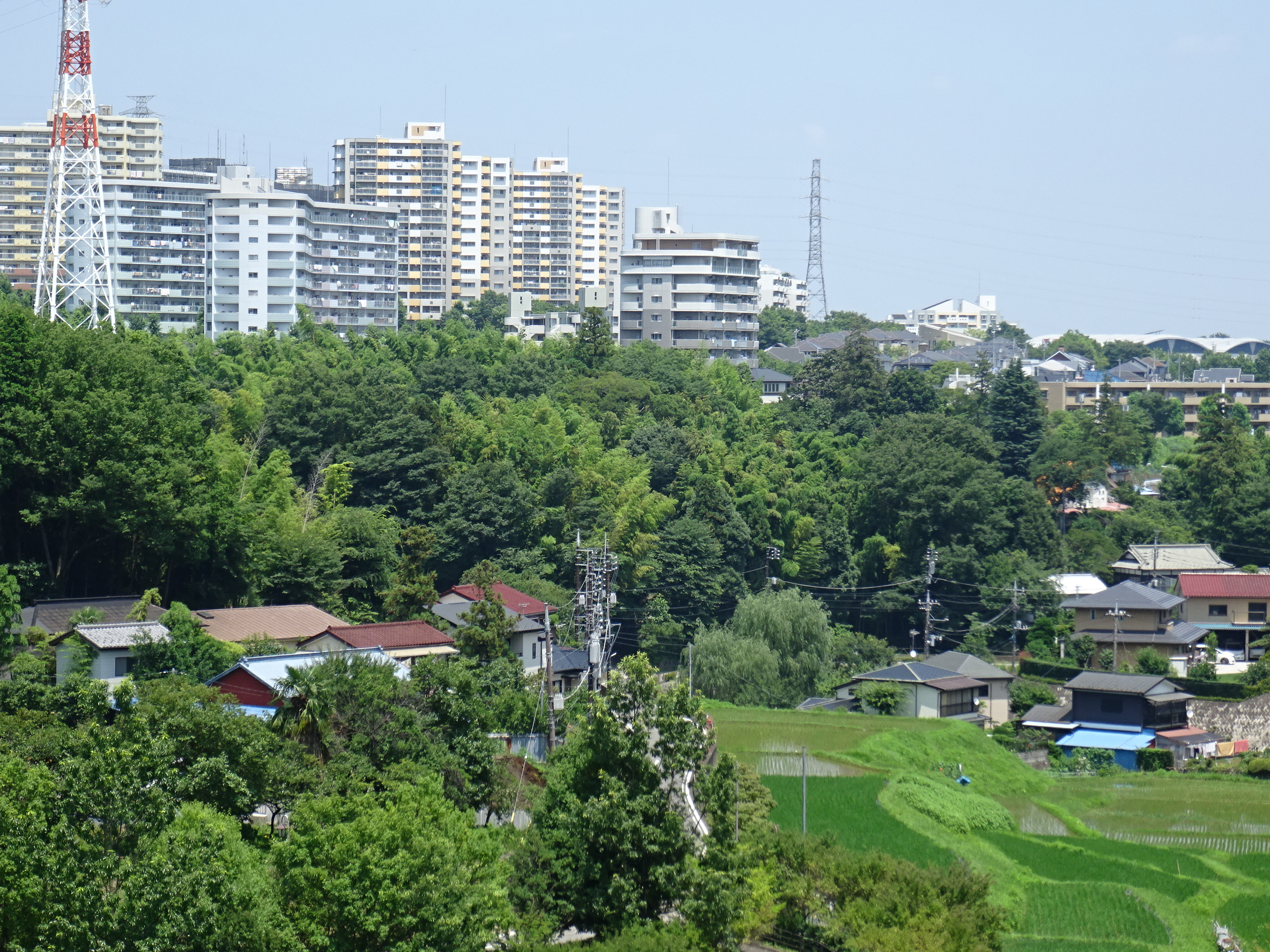 田園風景の中にそびえる多摩ニュータウン長峰団地（15/07/10撮影）